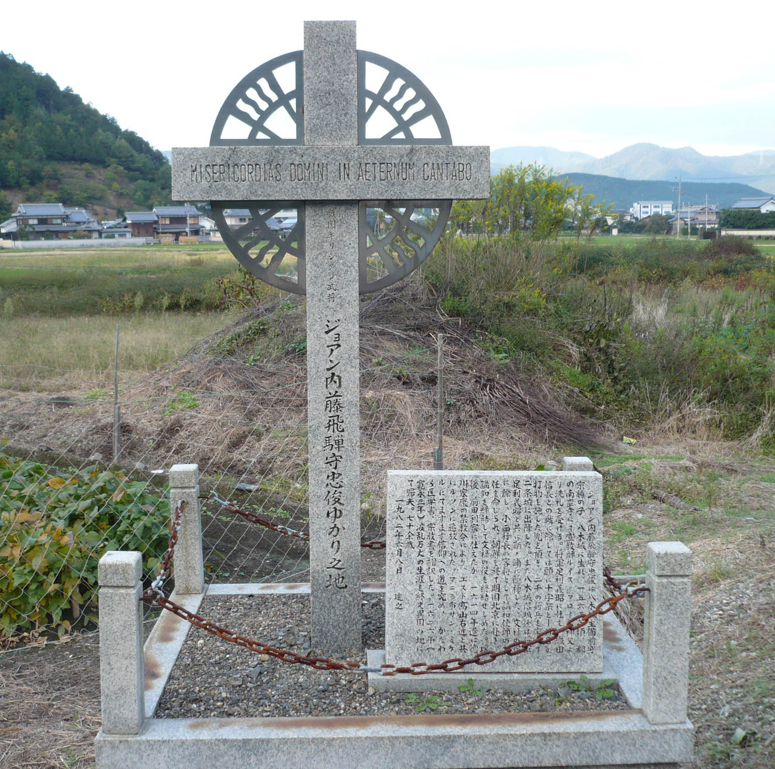 ジョアン内藤ゆかり之地の石碑